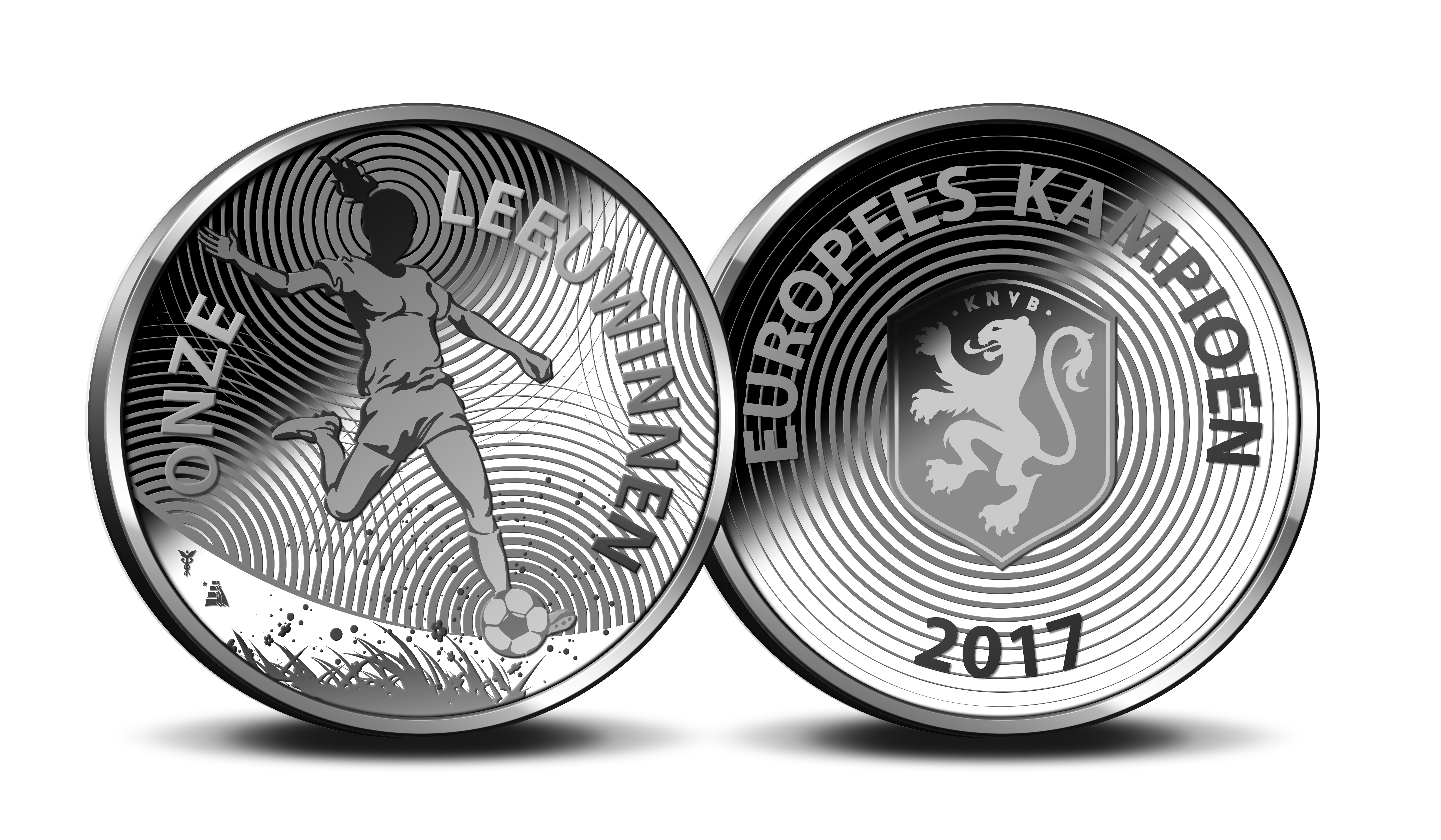 Ontwerp van herdenkingsmunt 'Oranje Leeuwinnen Penning', een officiële uitgifte ter ere van het EK vrouwenvoetbal in Nederland.